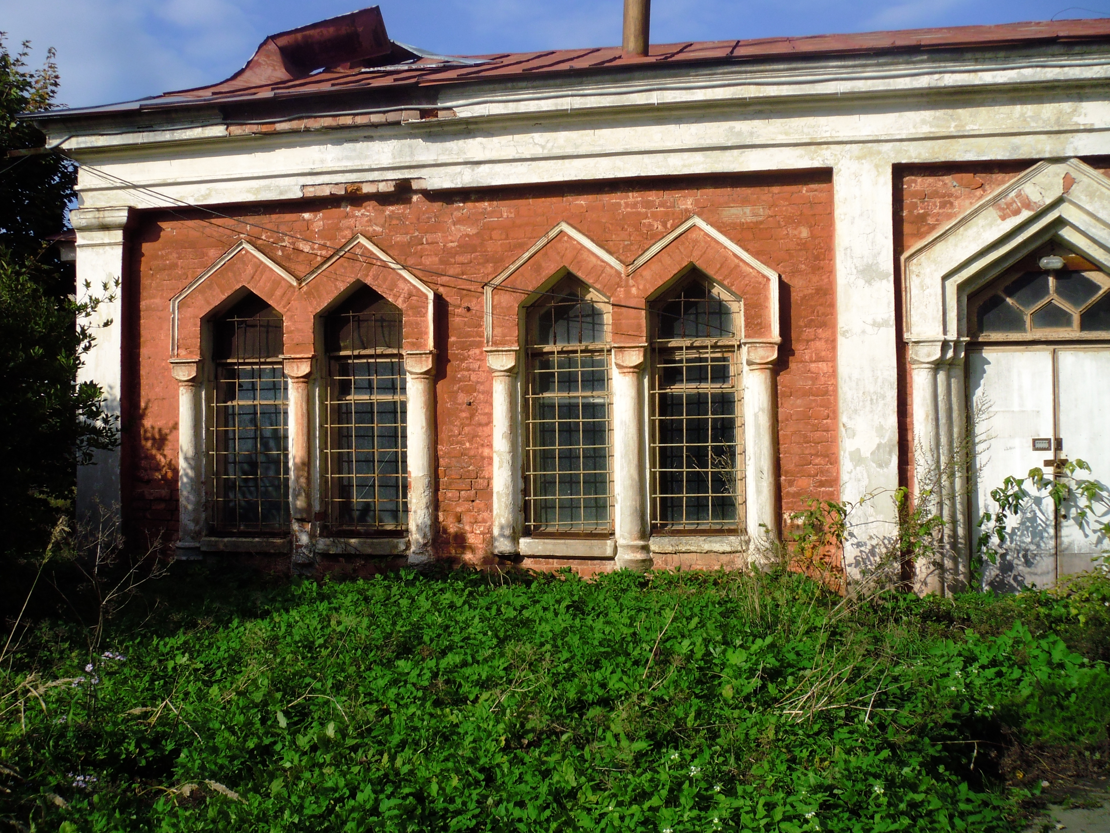 Сестрорецк СПб. Петровский Арсенал. Здание пристрелочного стрельбища бывшего оружейного завода по состоянию на 2014 год. Памятник промышленной архитектуры, находится под охраной КГИОП СПб.